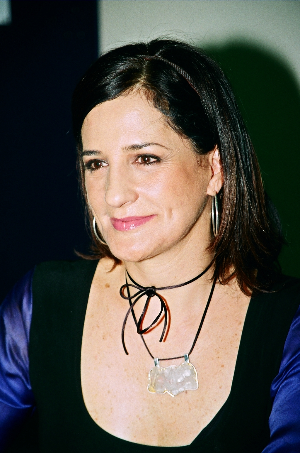 Mônica Waldvogel (São Paulo, 9 de fevereiro de 1956) é uma jornalista e apresentadora brasileira